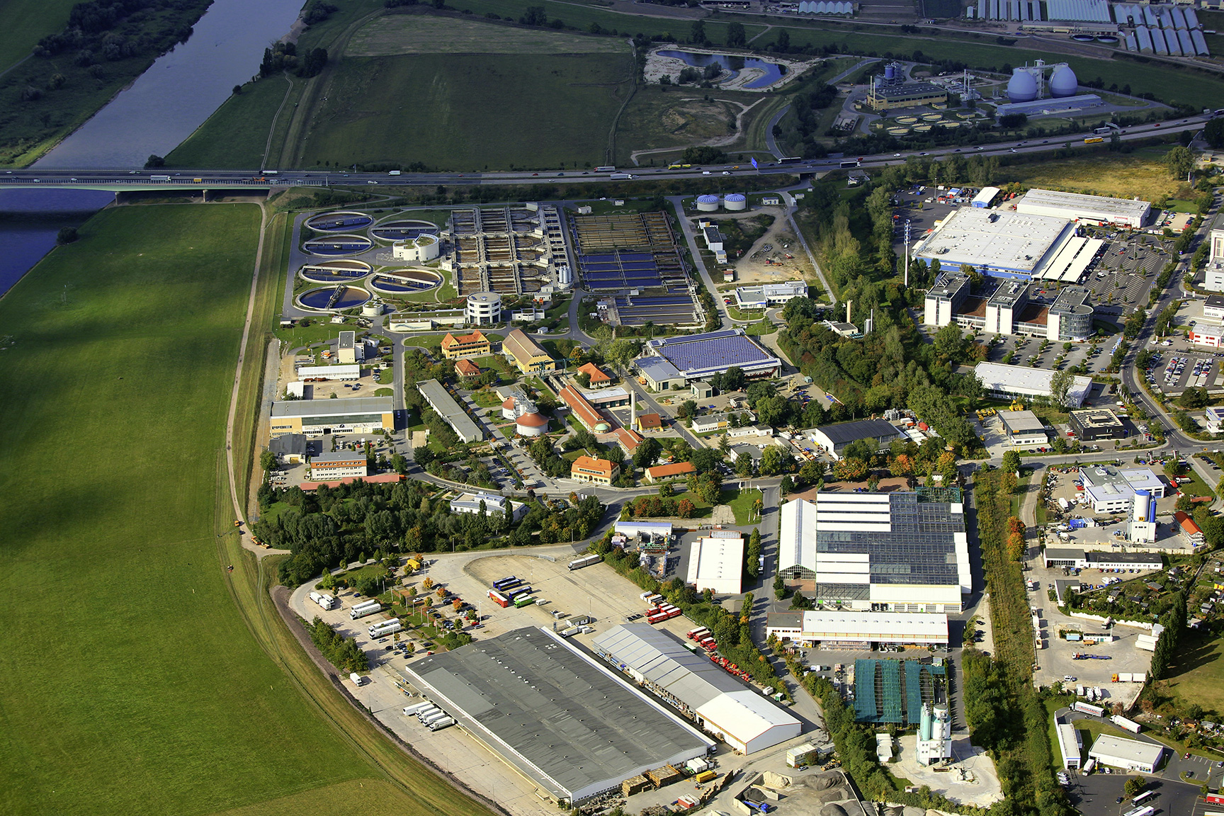 Luftbild über die komplette Kläranlage, im Hintergrund jenseits der Bundesautobahn A 4 die Schlammbehandlung (Baufeld B). Im Vordergrund und rechts neben dem Grünzug Gewerbeflächen.